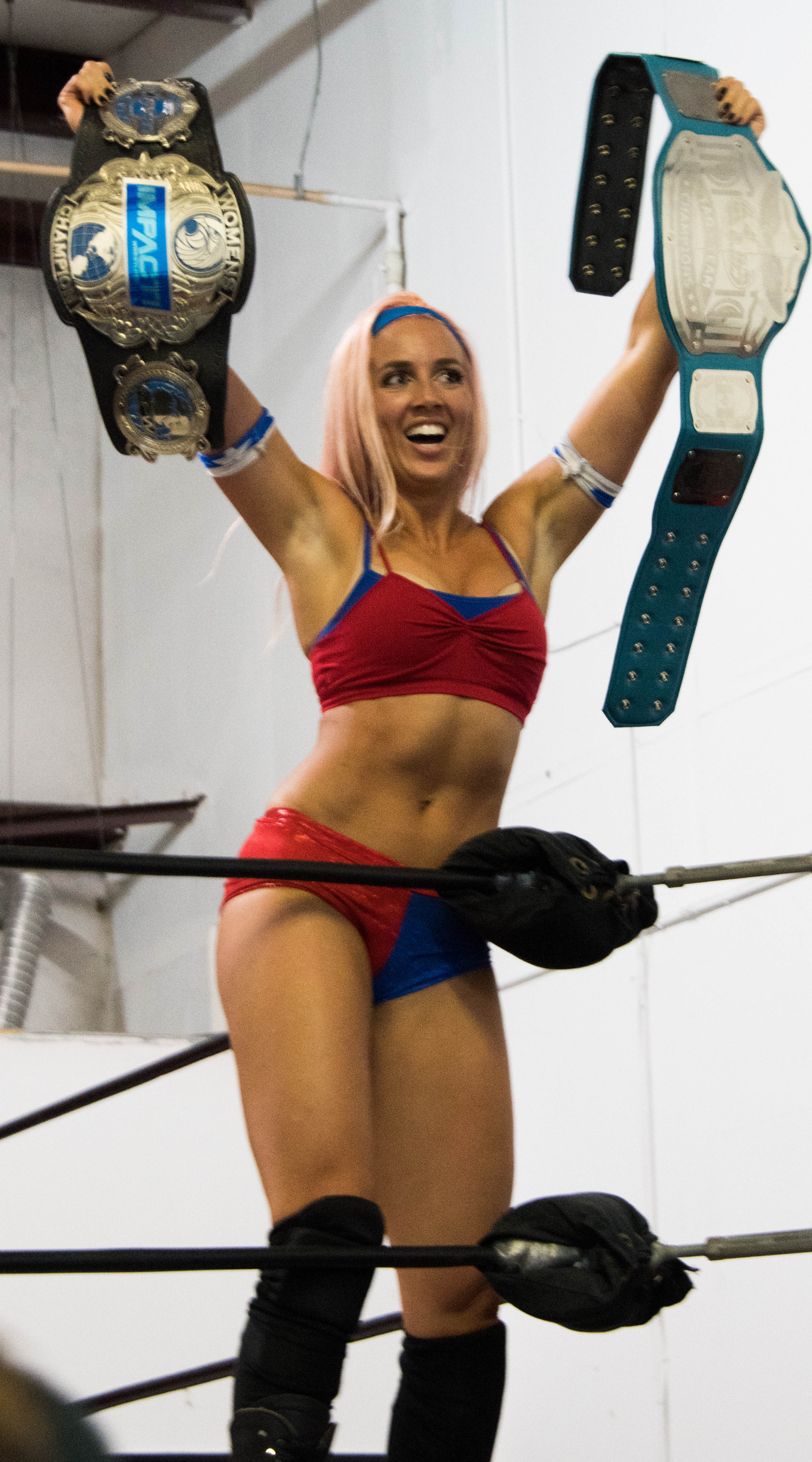 La catcheuse Laurel Van Ness brandissant les ceintures de championne des Knockout d'Impact Wrestling et de championne par équipes féminine de la Pro Wrestling 2.0